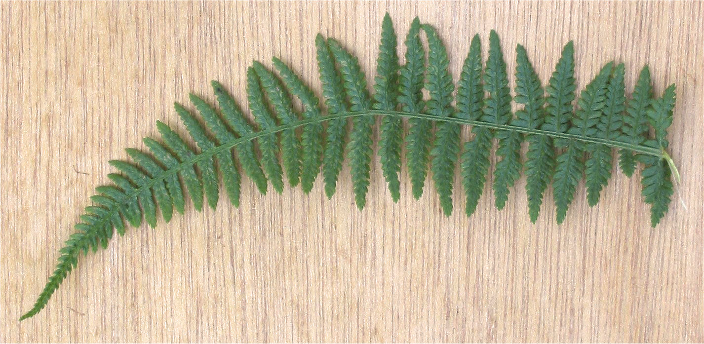 (nl: Wijfjesvaren blad) Athyrium filix-femina leaf part